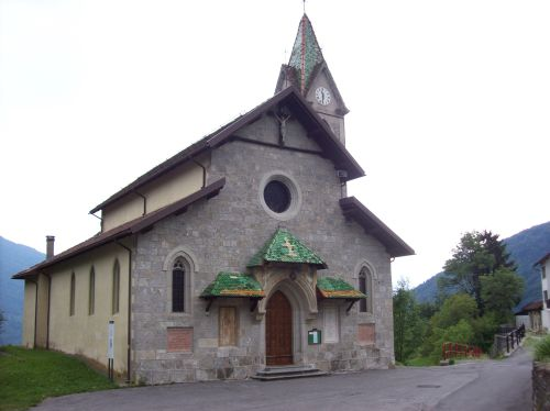 Mione di Ovaro (UD-Friuli Venezia Giulia-Italia) Chiesa di Sant'Antonio